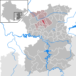 Solkwitz in Thuringia - Saale-Orla-Kreis